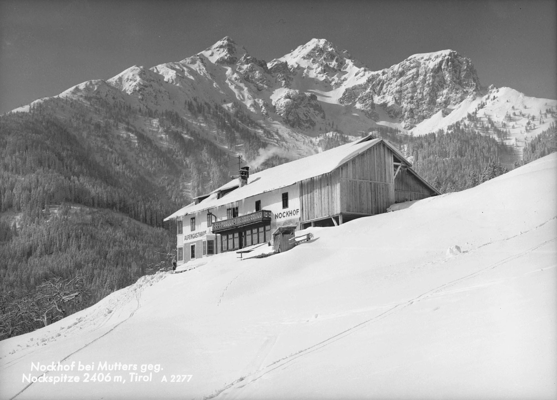 Nockhof bei Mutters gegen Nockspitze 2406 m / Tirol